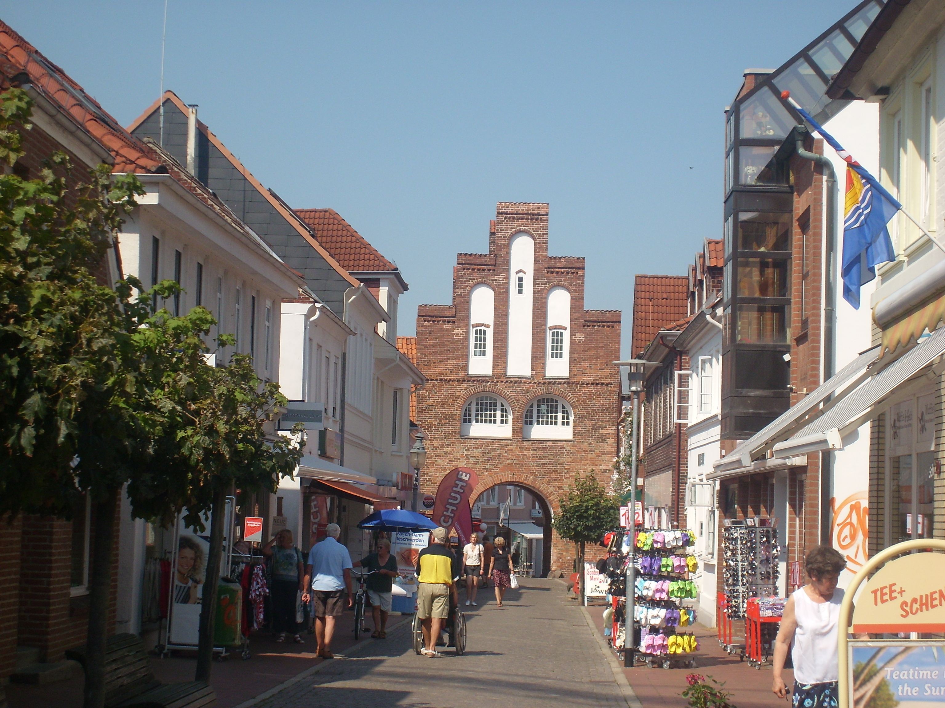 Neustadt in Holstein: Kremper-Straße mit dem Kremper-Tor im Juli 2010